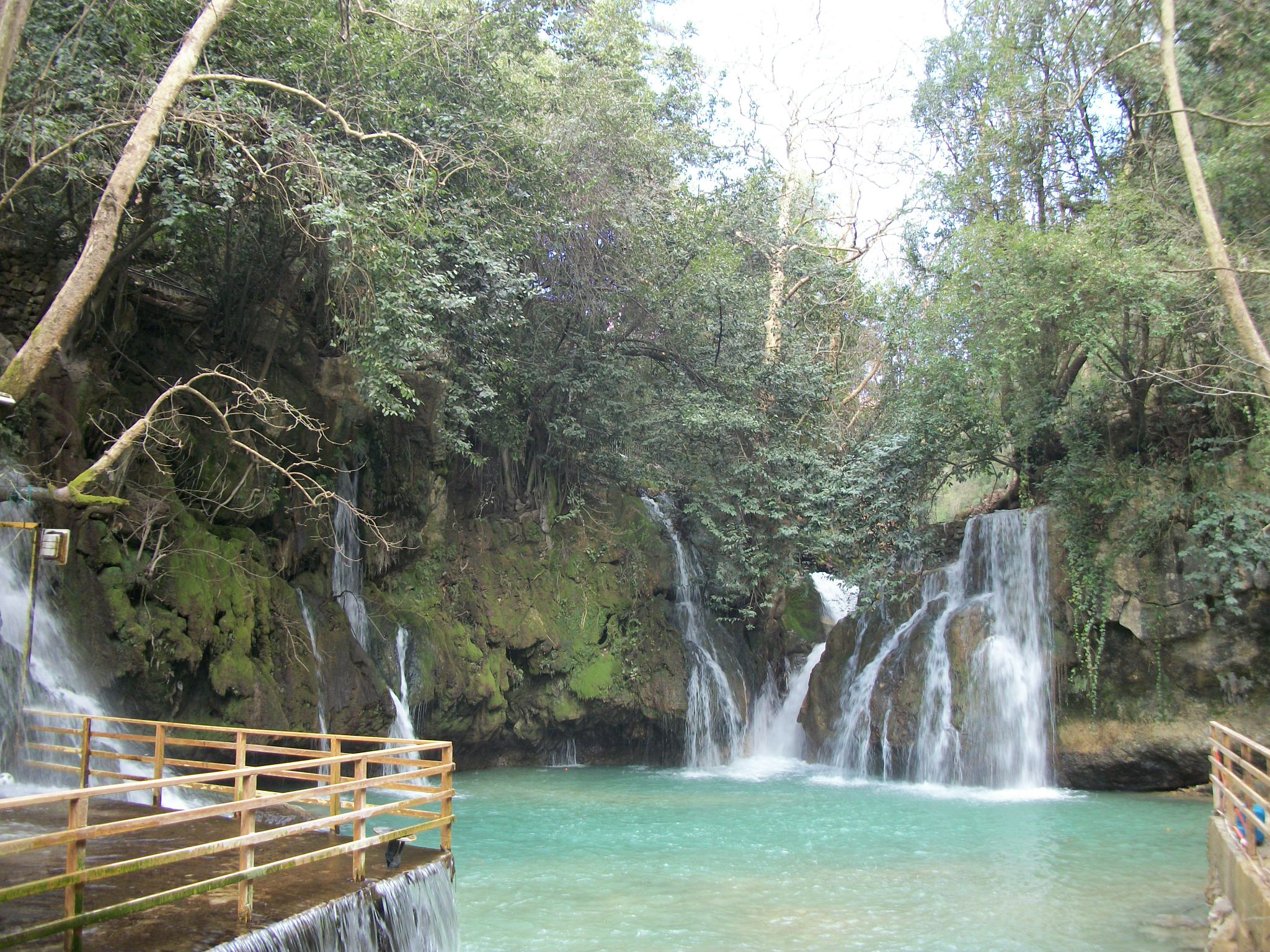 Cascade bleue de Shallalat Al Zarka